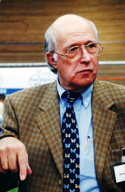 Manfred Böhmer, Präsident des BDR (1997-2001)